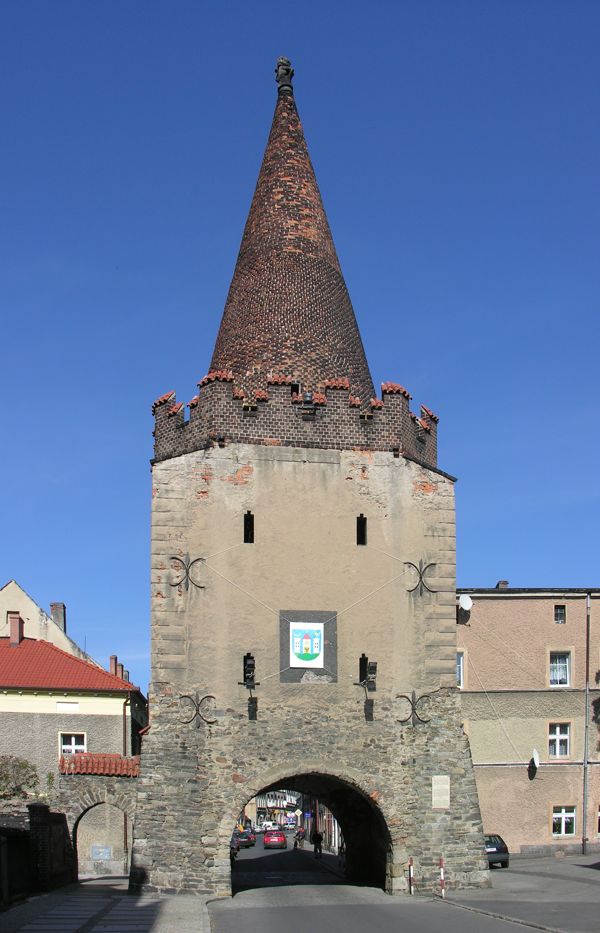 Ziębice - Brama Paczkowska